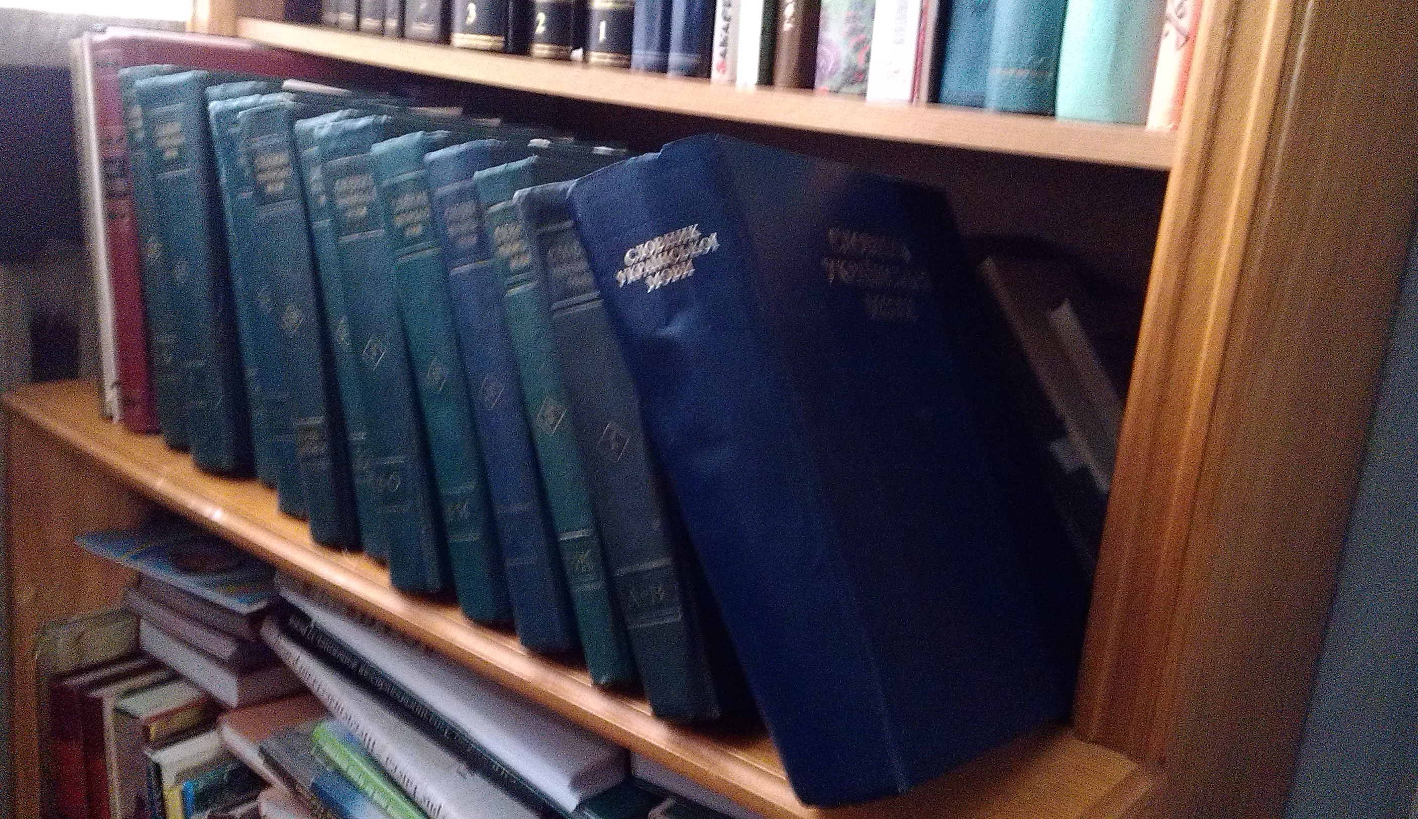 Книги доктора філологічних наук Галини Макарівни Гнатюк на полиці в кабінеті Дмитра та Галини Гнатюків.